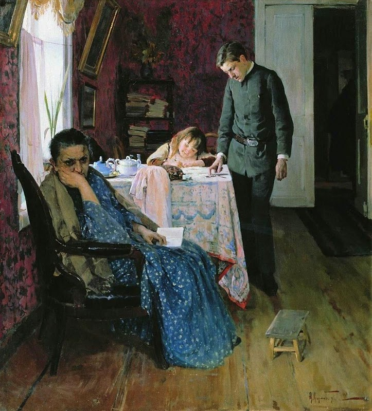 «Опять провалился»title QS:P1476,ru:"Опять провалился" label QS:Lru,"Опять провалился" label QS:Lde,"wieder gescheitert"